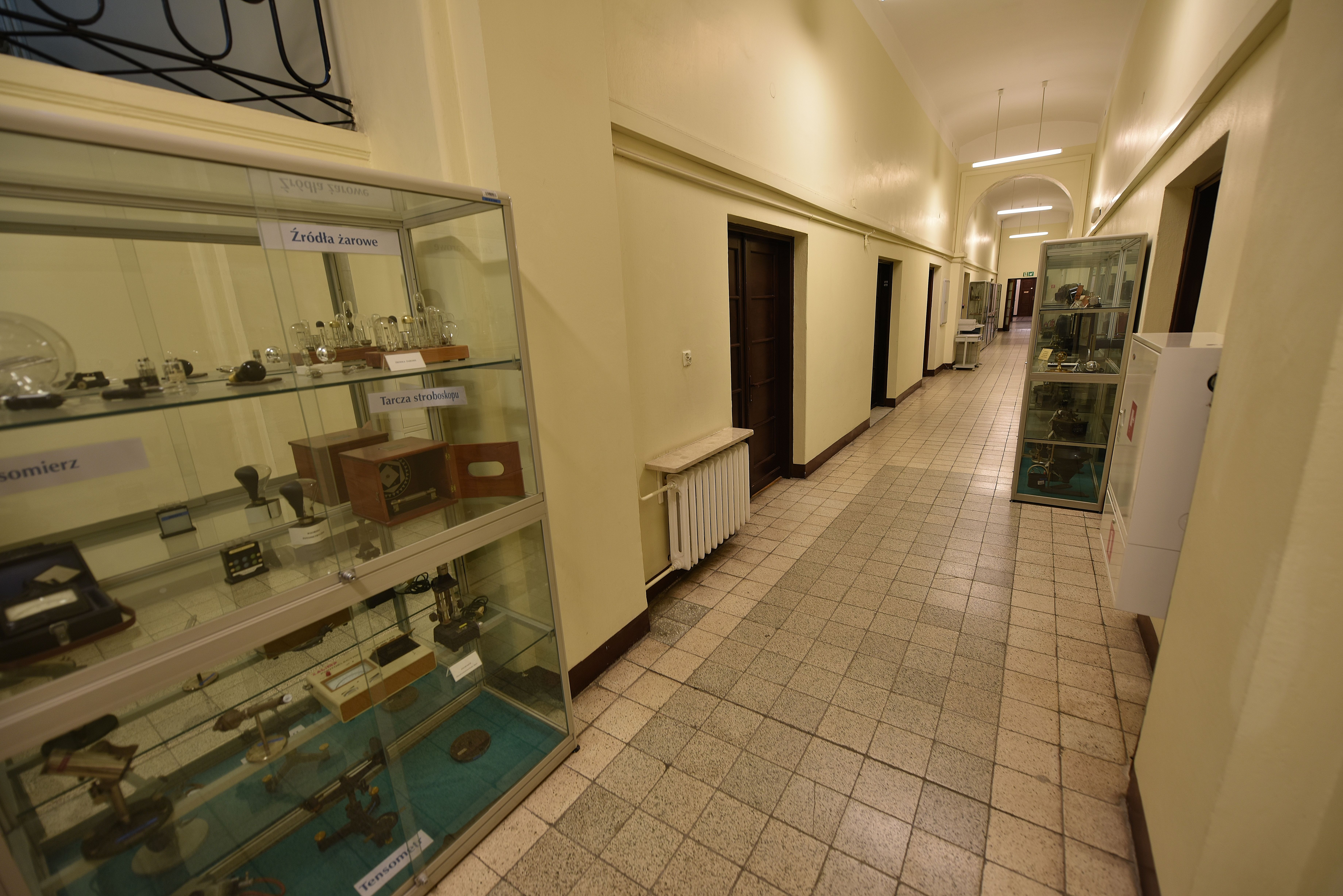 Fragment kolekcji instrumentów pomiarowych eksponowanych na korytarzu Głównego Urzędu Miar w Warszawie